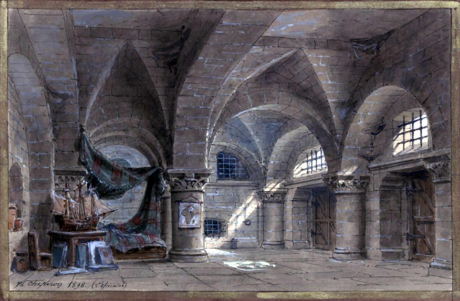 Esquisse du décor de l'Acte II de L'Africaine de Meyerbeer